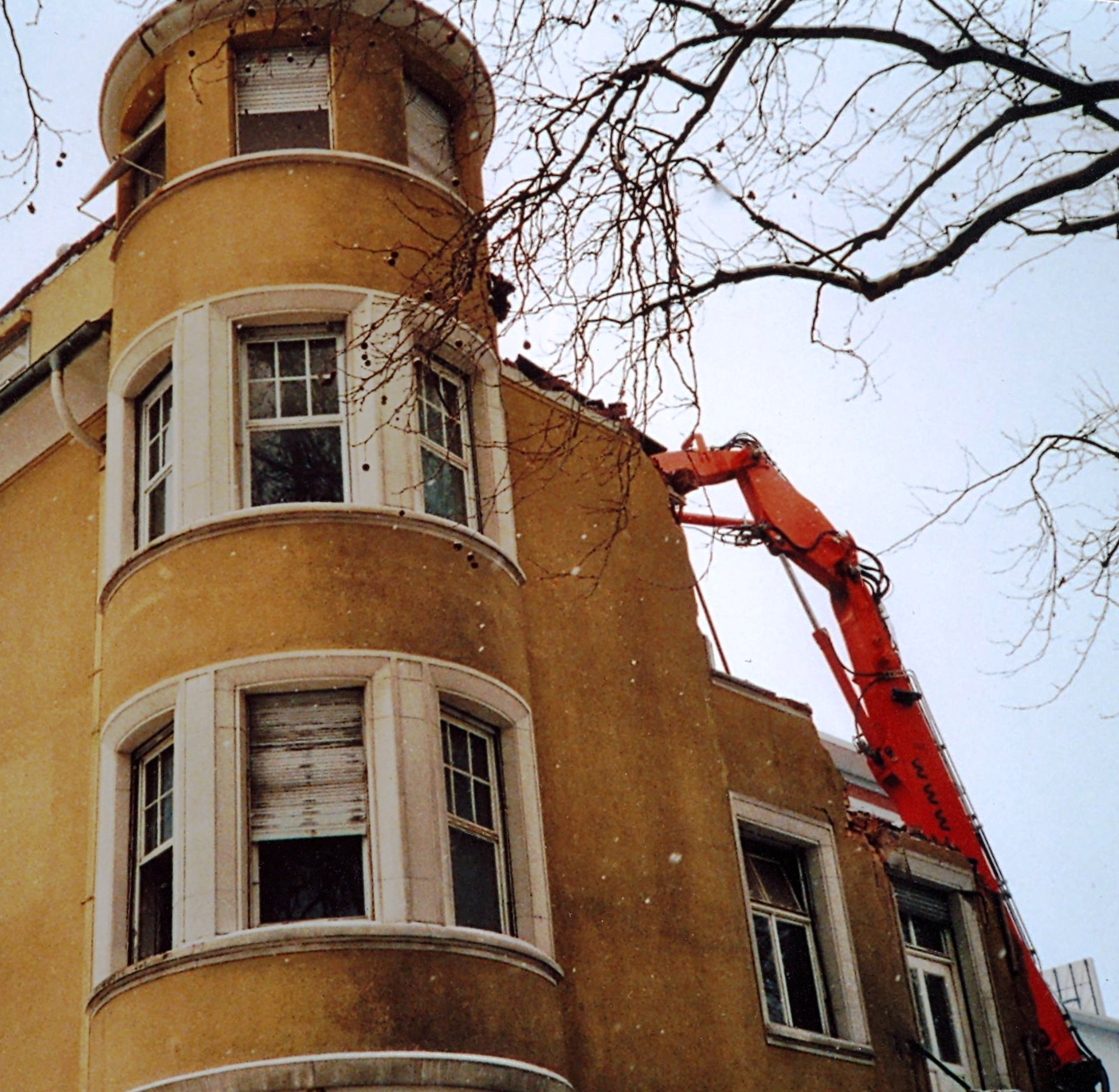 Heilbronn Badstraße Villa Angele erbaut 1925 Abbruch 16 Februar 2010 Variante 1.jpg